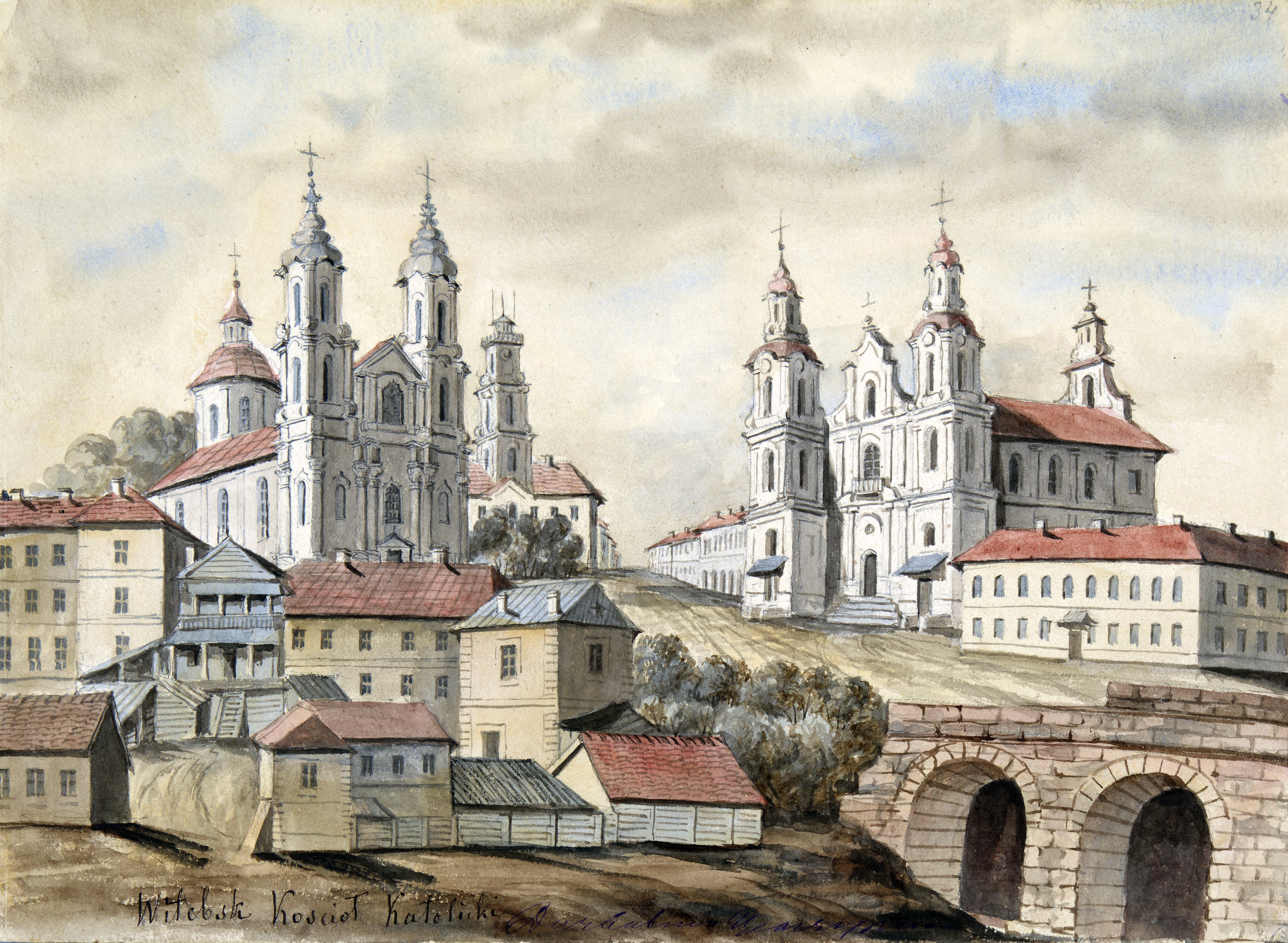 Беларуская (тарашкевіца): Віцебск (Viciebsk), вуліца Вялікая (vulica Vialikaja)